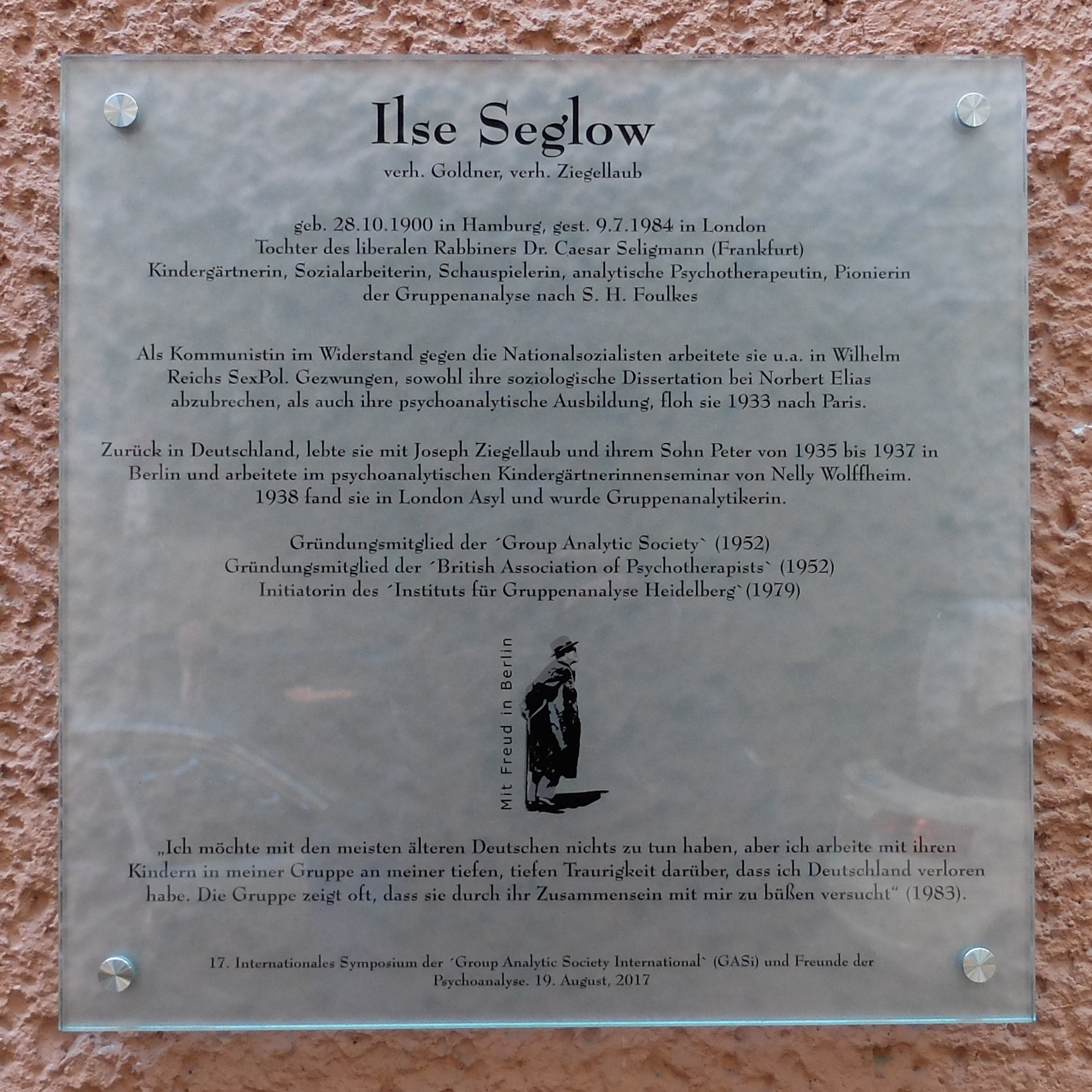 Gedenktafel für Ilse Seglow in der Duisburger Straße 2, Berlin. Teil des Projektes "Mit Freud in Berlin".